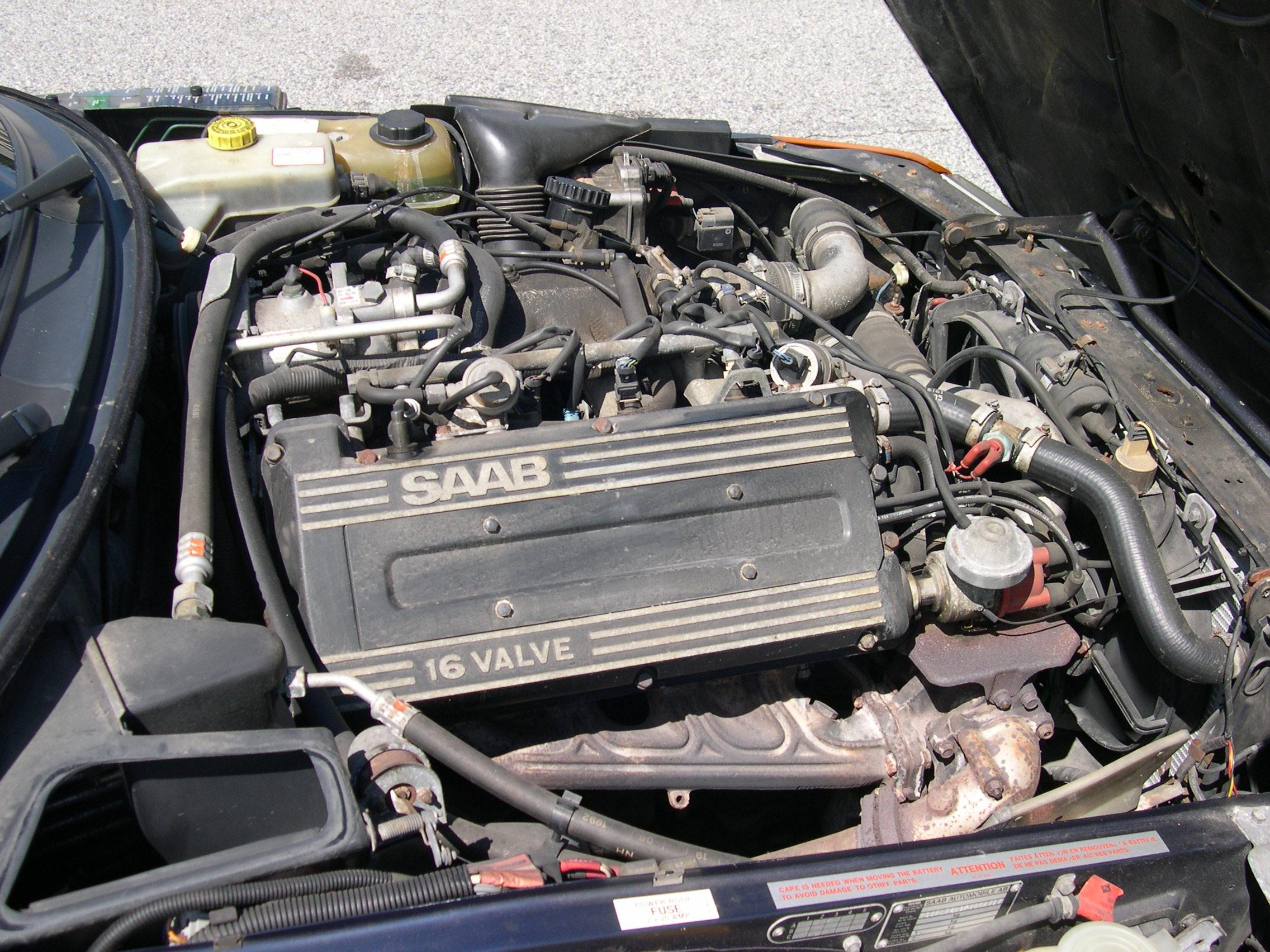 1993 Saab 900T convertible B202 2.0 L 16-valve turbo engine Photo by User:Sfoskett